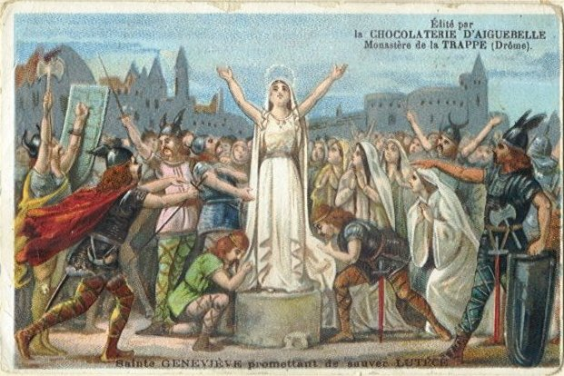 Image publicitaire du chocolat Aiguebelle (vers 1910)